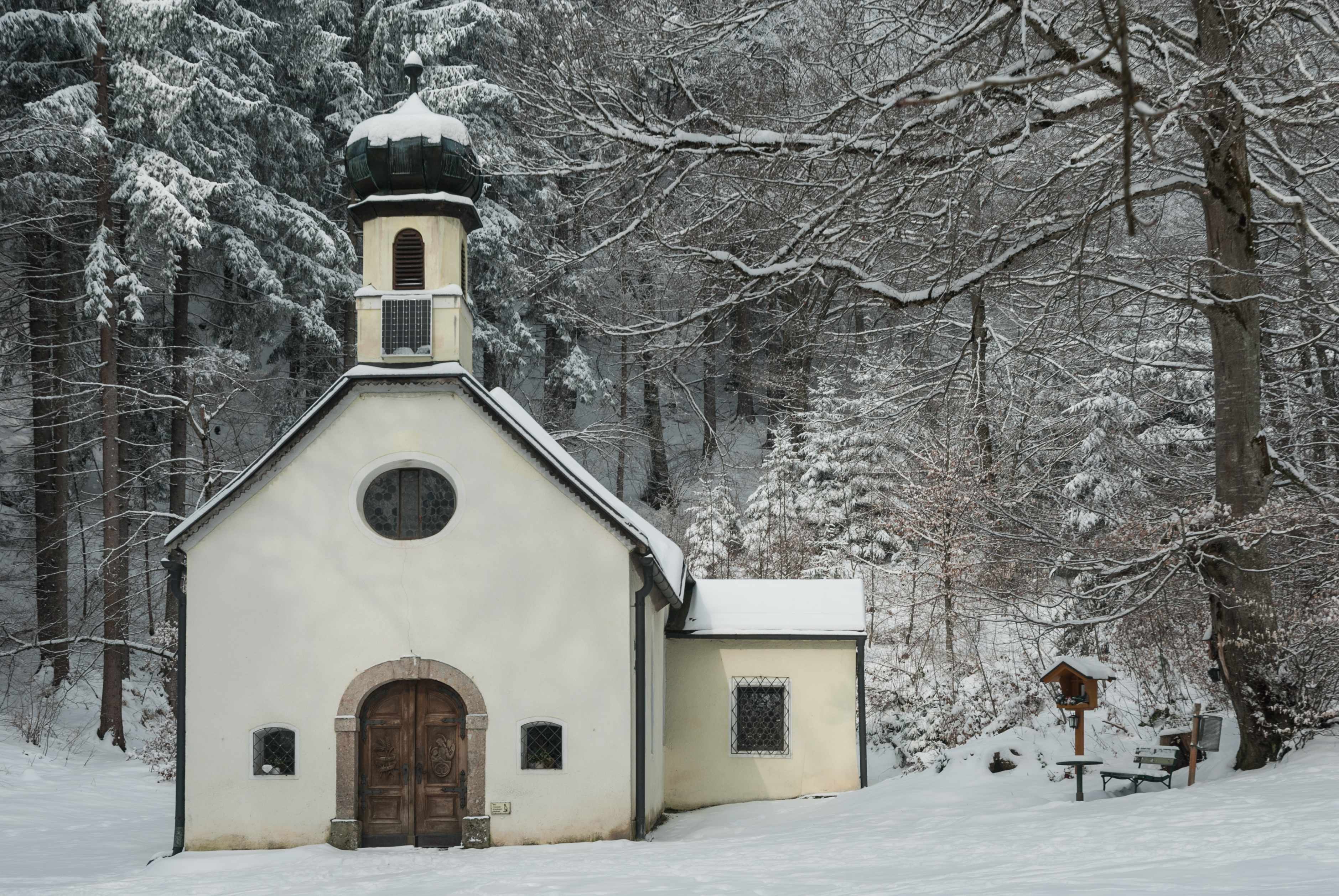 Das Höttinger Bild im verschneiten Wald